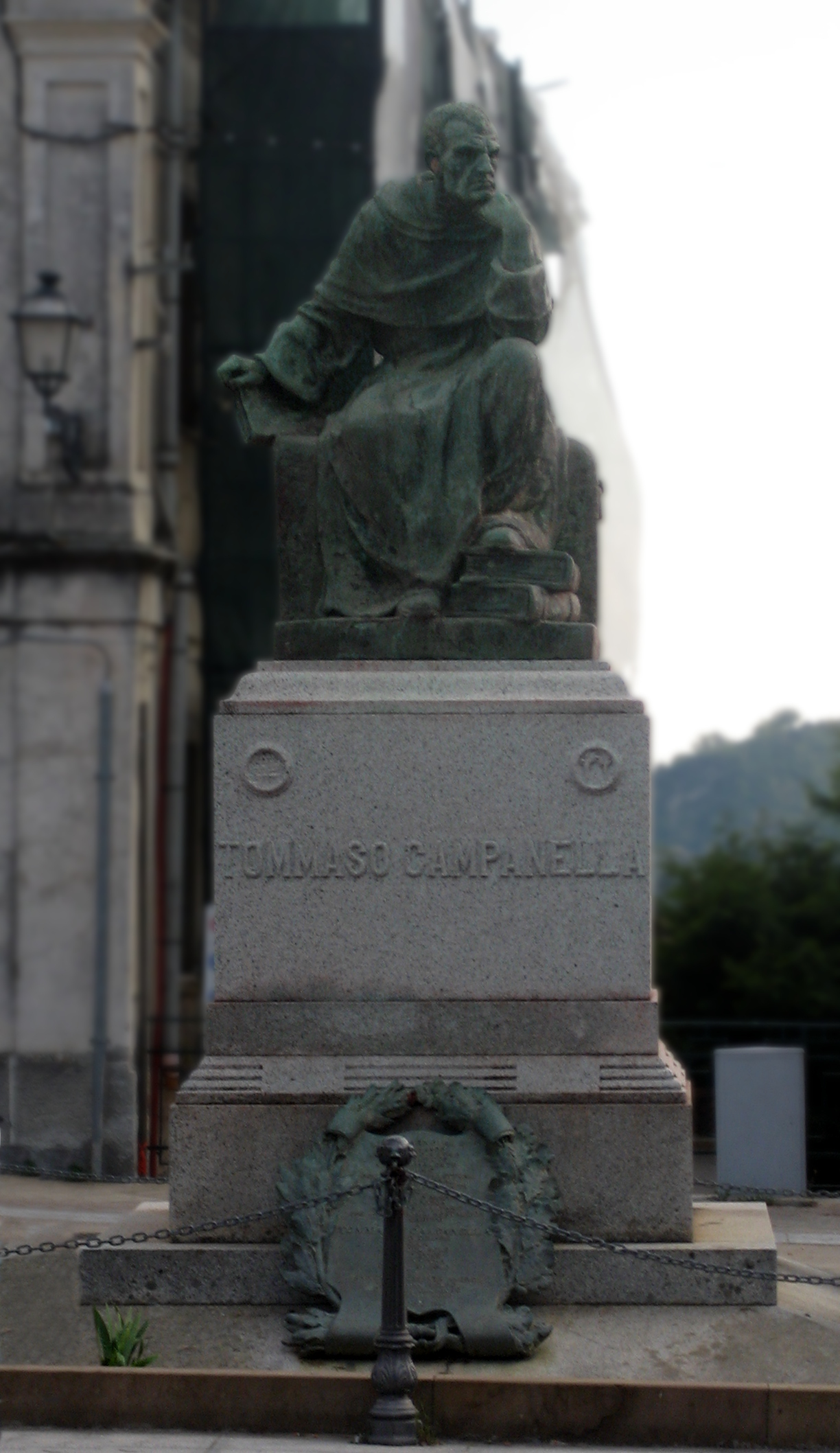 Statua di Tommaso Campanella a Stilo